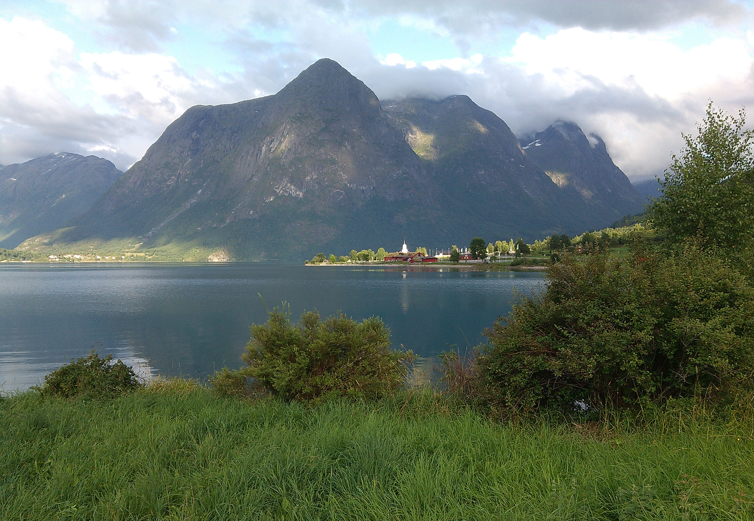 Oppstryn. Norway.